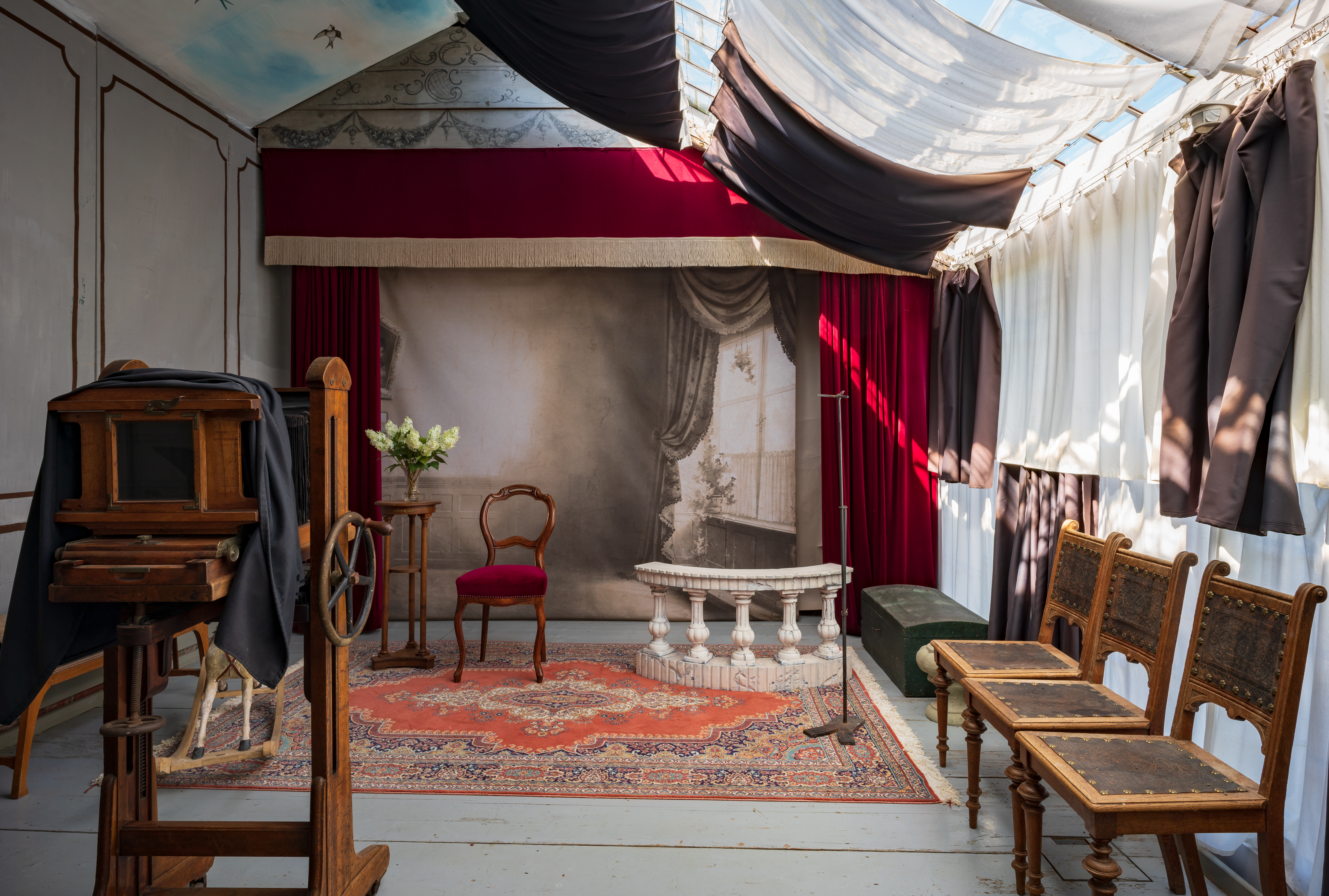 Freilichtmuseum Beuren (Landkreis Esslingen): Fotoatelier aus Kirchheim unter Teck, Innenansicht des Atelierraumes.Laut der Infotafel am Gebäude sind nur wenige Fotoateliers aus der Zeit vor dem Zweiten Weltkrieg erhalten geblieben, dieser Raum mit seiner originalen Ausstattung ist also eine Rarität.